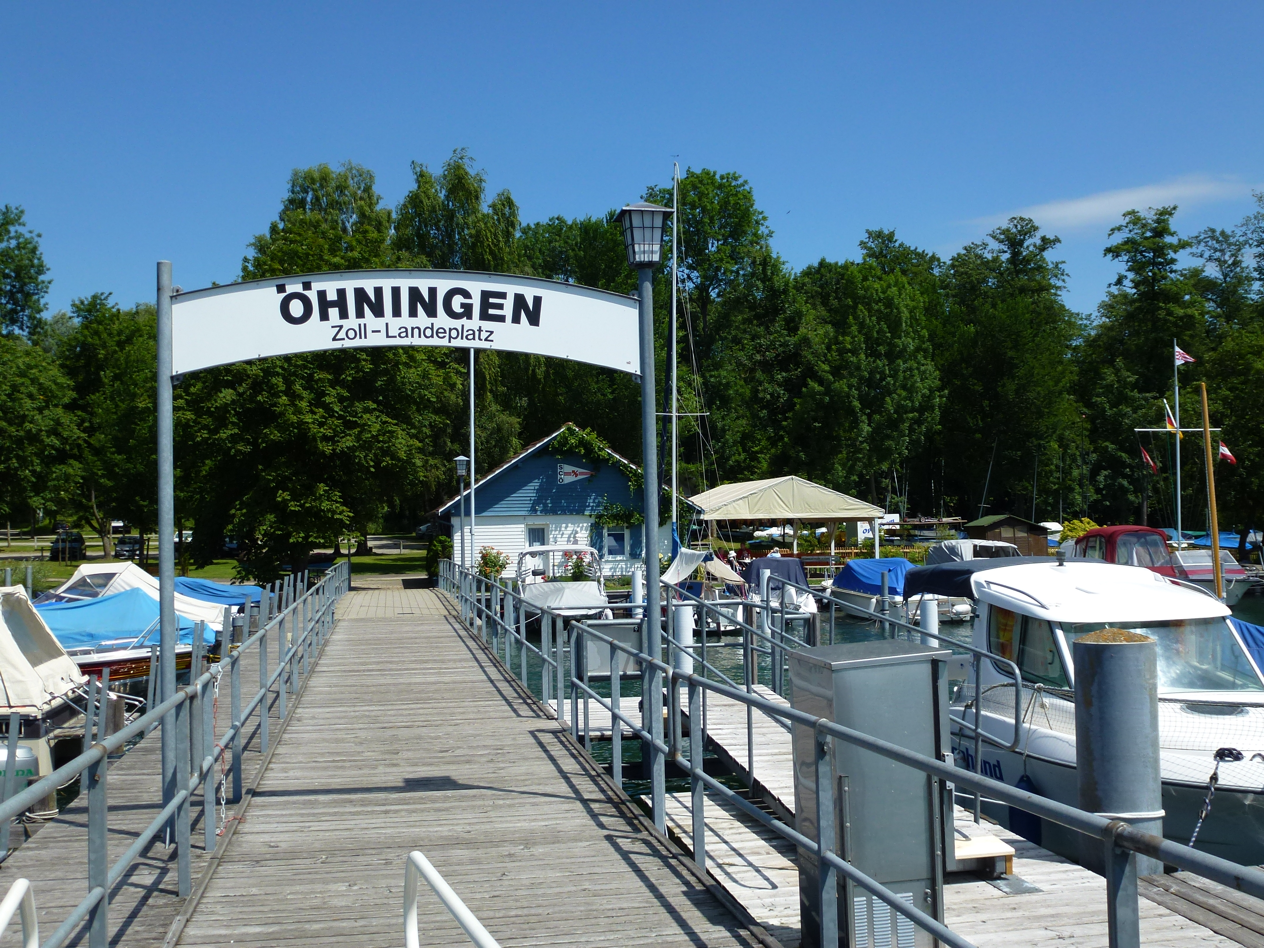 Steg zum Schiffslandeplatz mit Hafen in Öhningen. Hinten rechts sieht man das Gelände des Segelclubs Öhningen mit Haus und überdachten Biergarten.